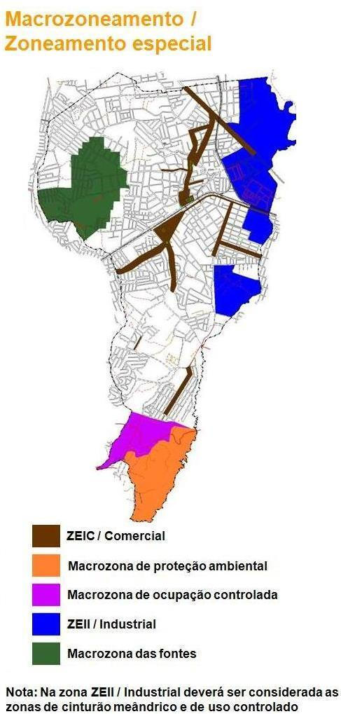 Macrozoneamento de poá-sp